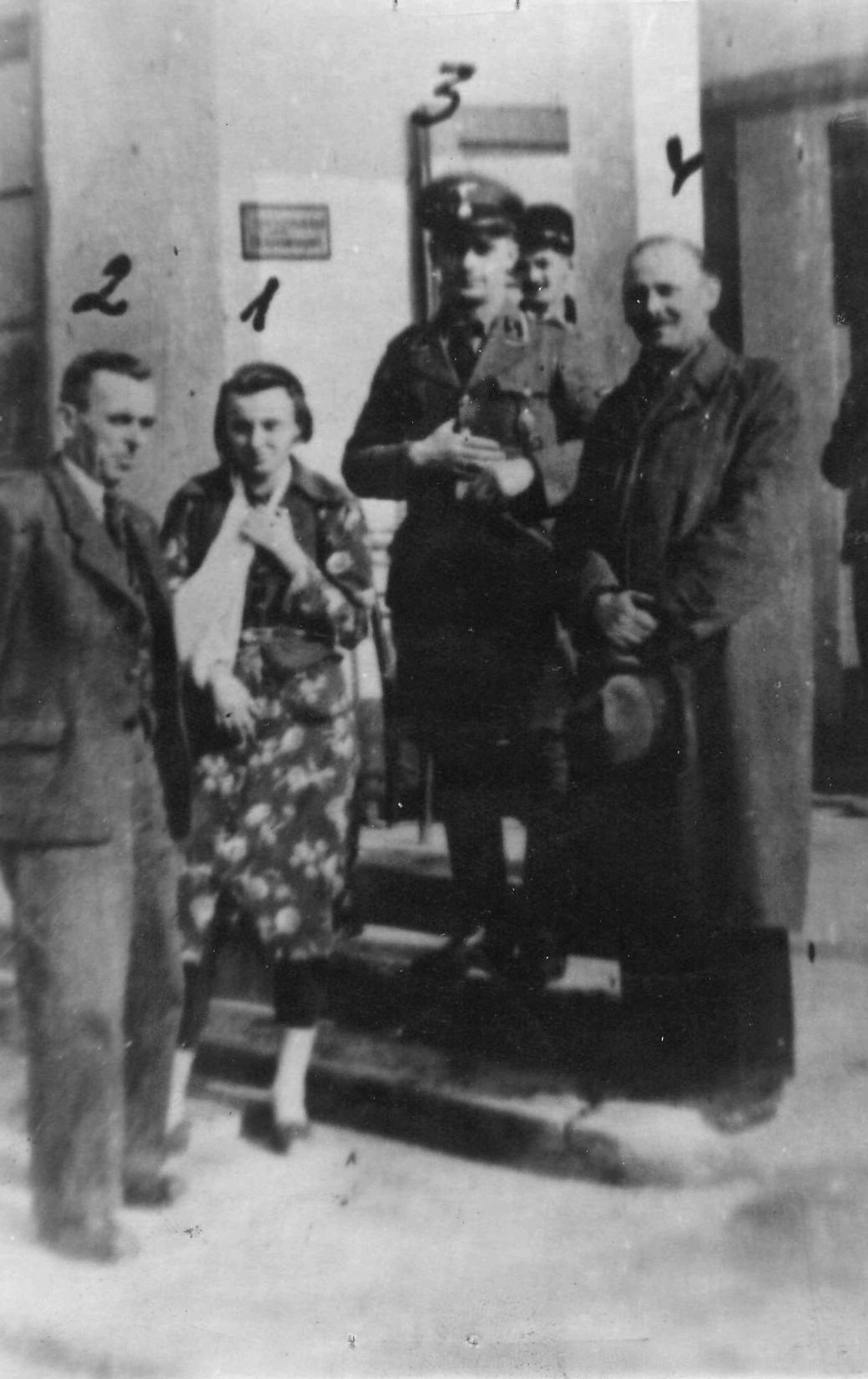 Vera Blagojević u logoru u Šapcu 1942. godine